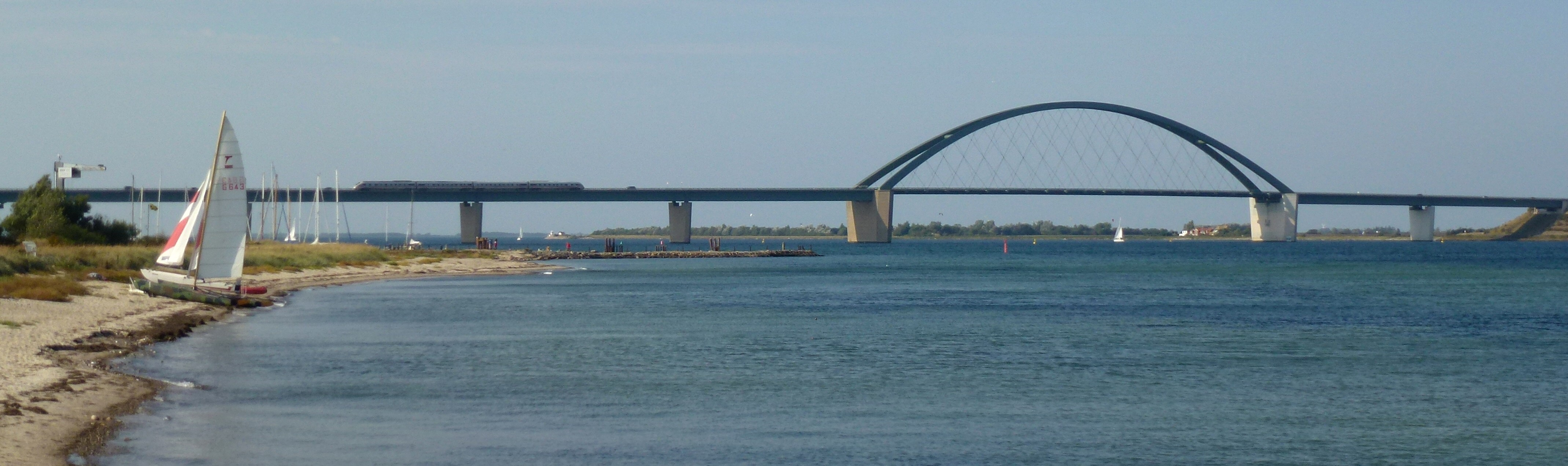 Fehmarnsundbron från Grossenbrode